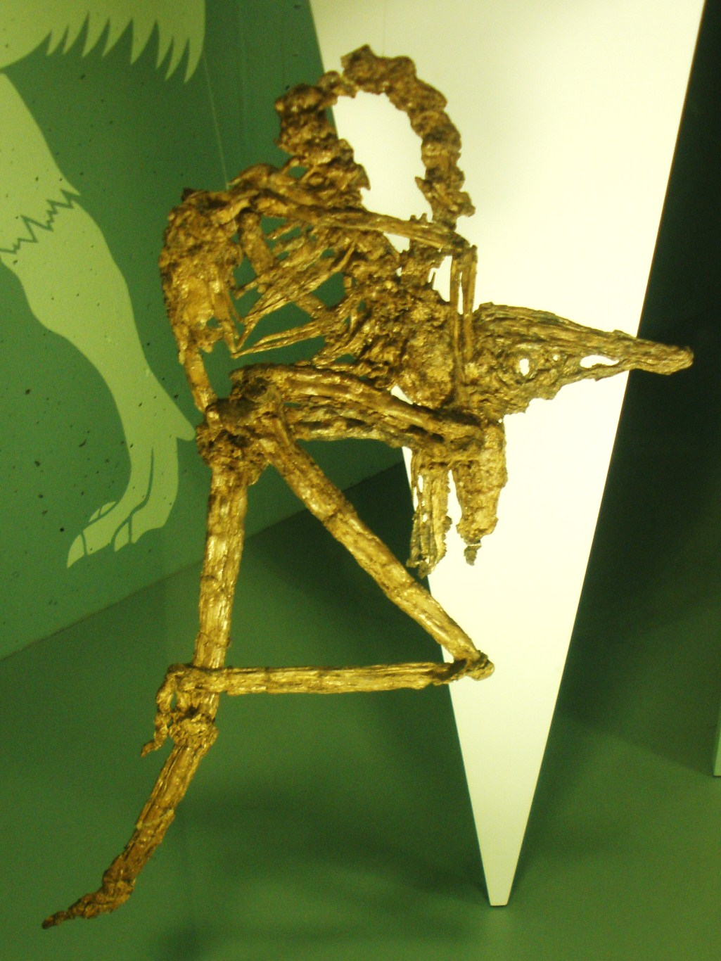 Fossil of Palaeotis, an extinct bird- Took the photo at Senckenberg Museum of Frankfurt